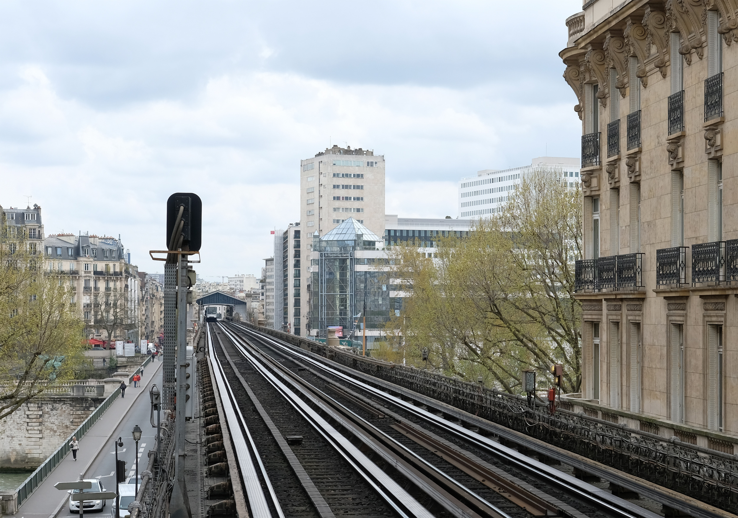 Ligne n°6 du métro de Paris sur le pont de Bir-Hakeim, depuis la station de Passy en direction de celle de Bir-Hakeim - Paris XVI et XV